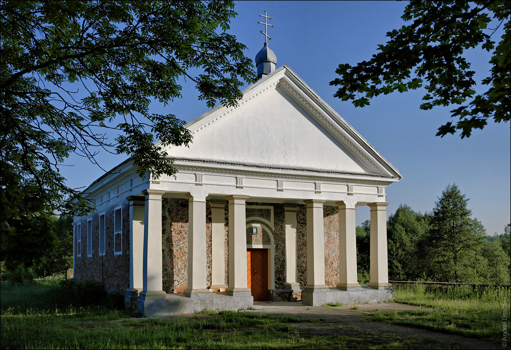 Касцёл Святых Пятра і Паўла. Гарнастаевічы